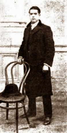 Salvador Planas i Virella detenido en Buenos Aires, Argentina